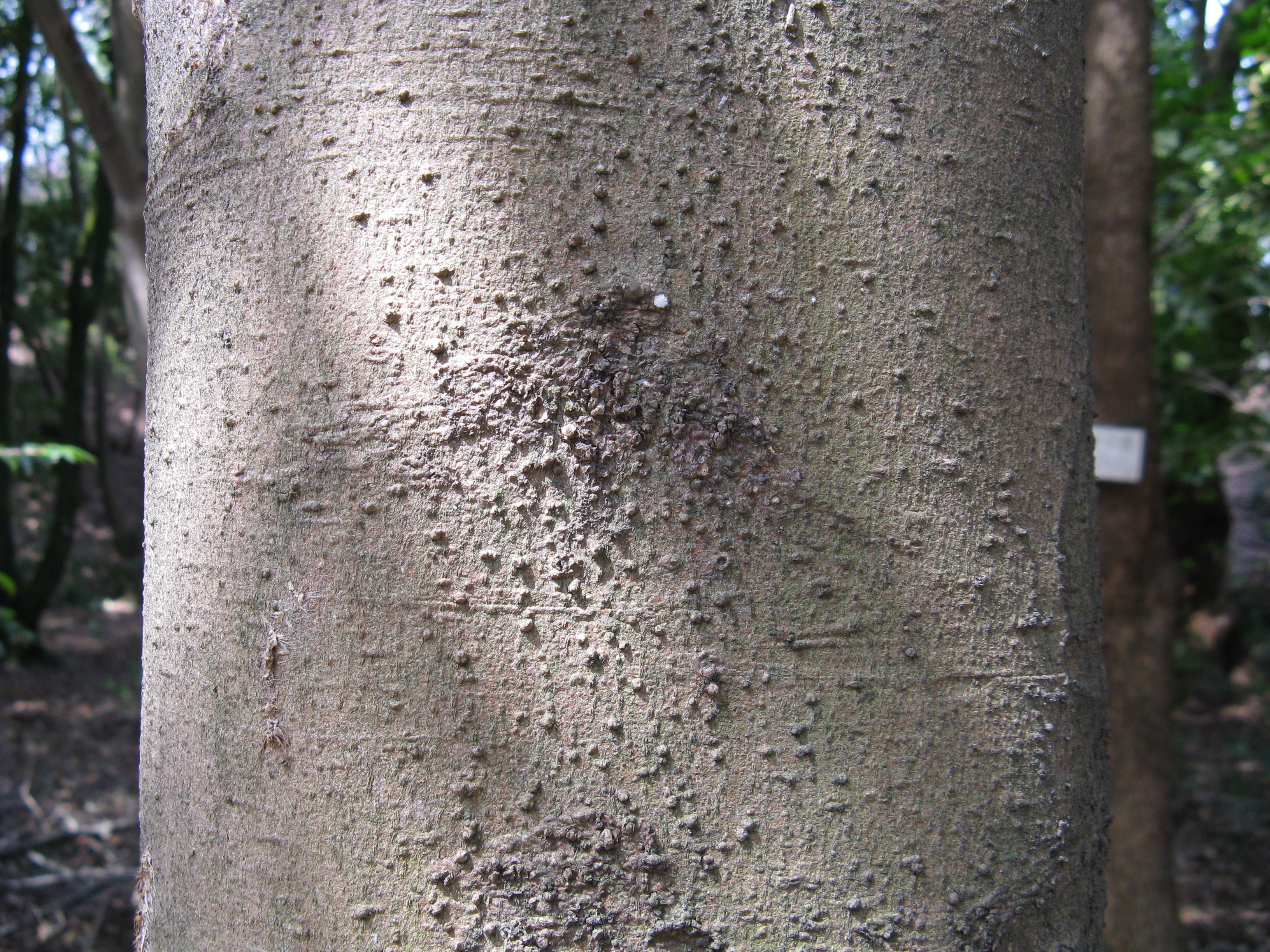 Scientific name Neolitsea aciculata